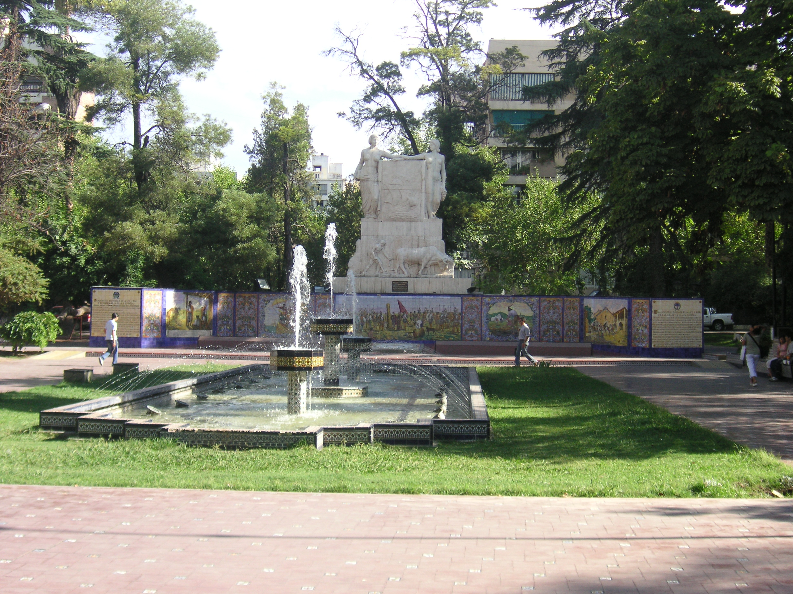 Spain Square, Mendoza, Argentina. En el mural se ve la fundación de Mendoza por parte de los españoles.Plaza España all told